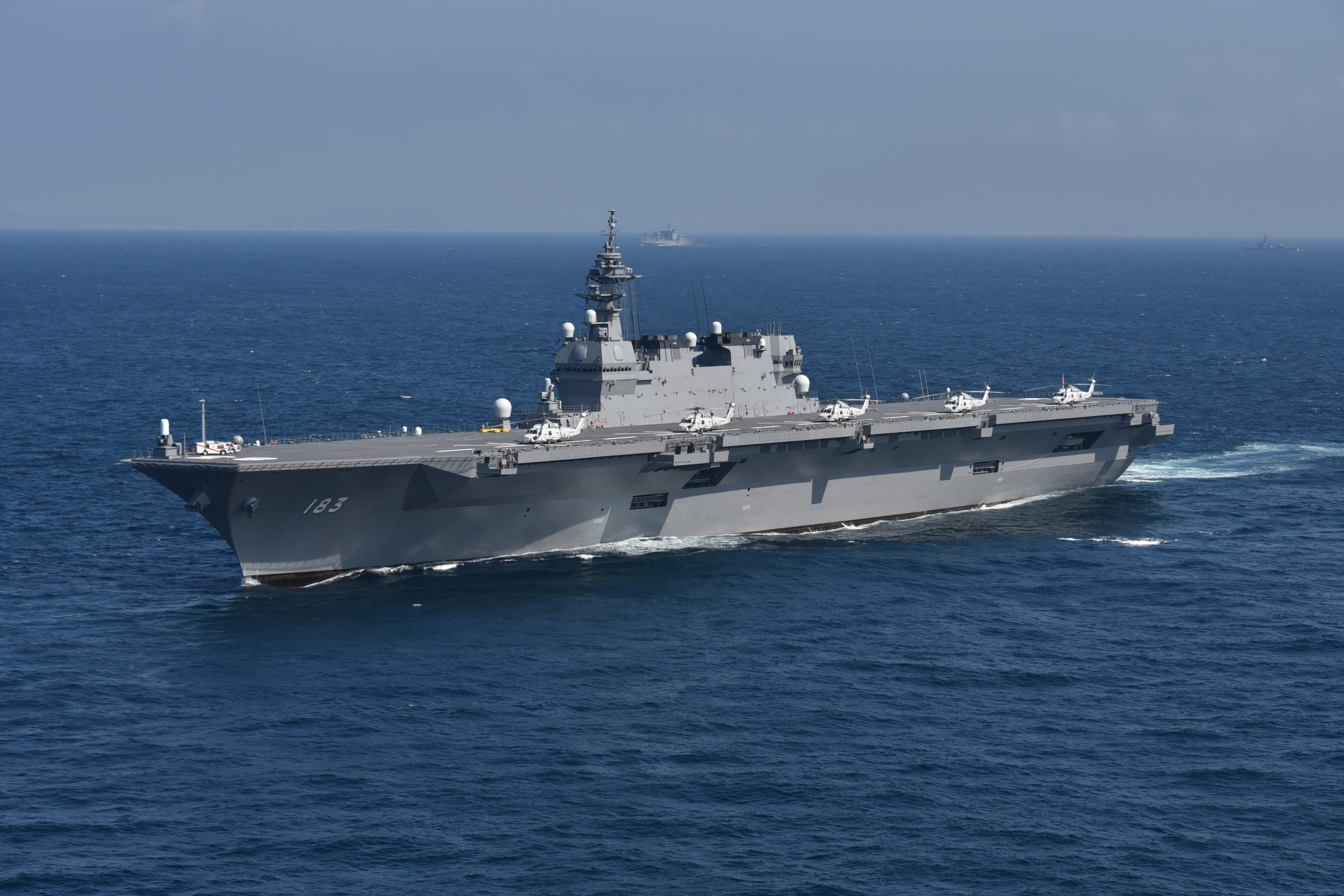 DDH-183 いずも